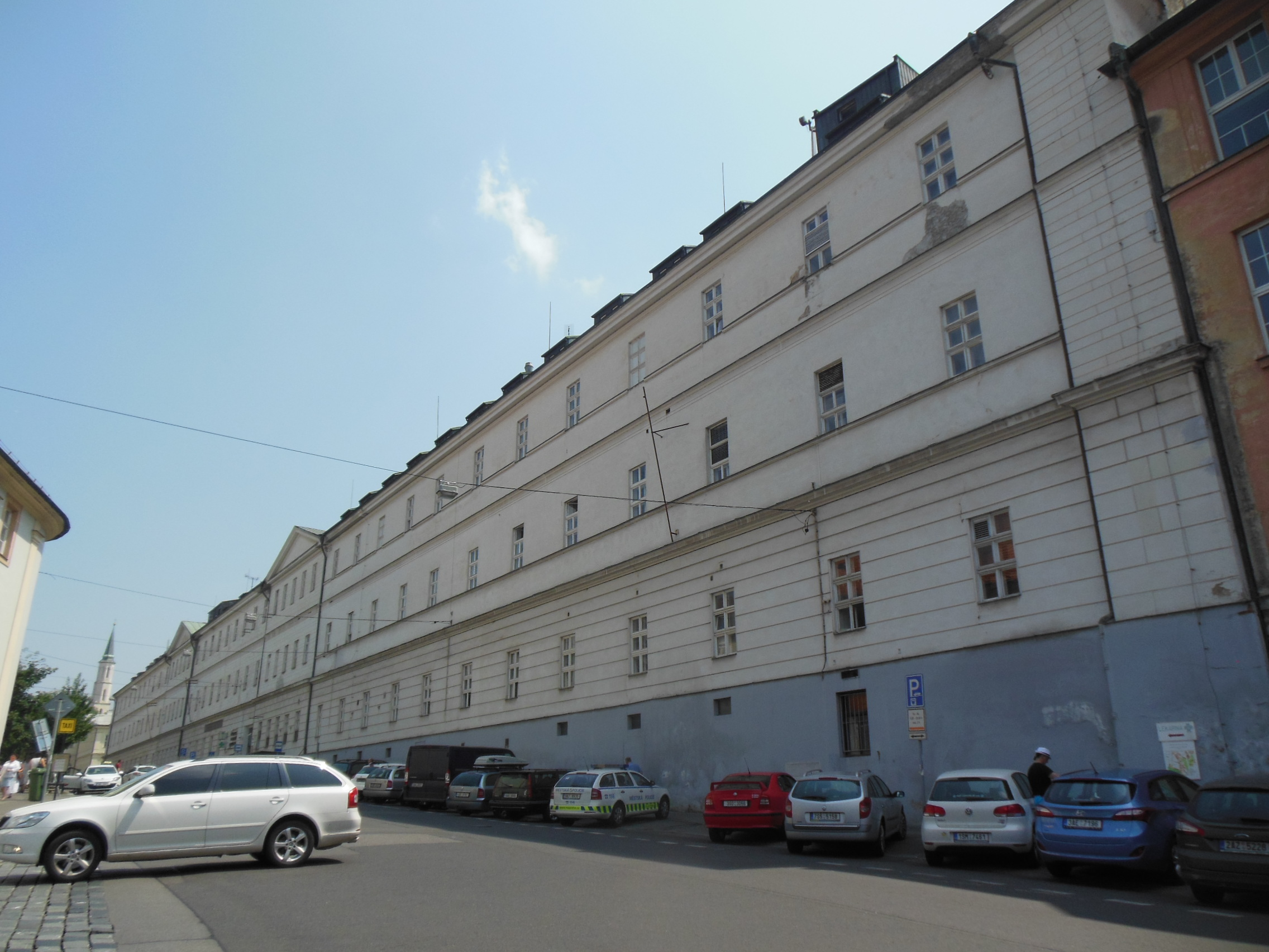 Budova Všeobecné fakultní nemocnice v ulici U Nemocnice na Novém Městě v Praze.